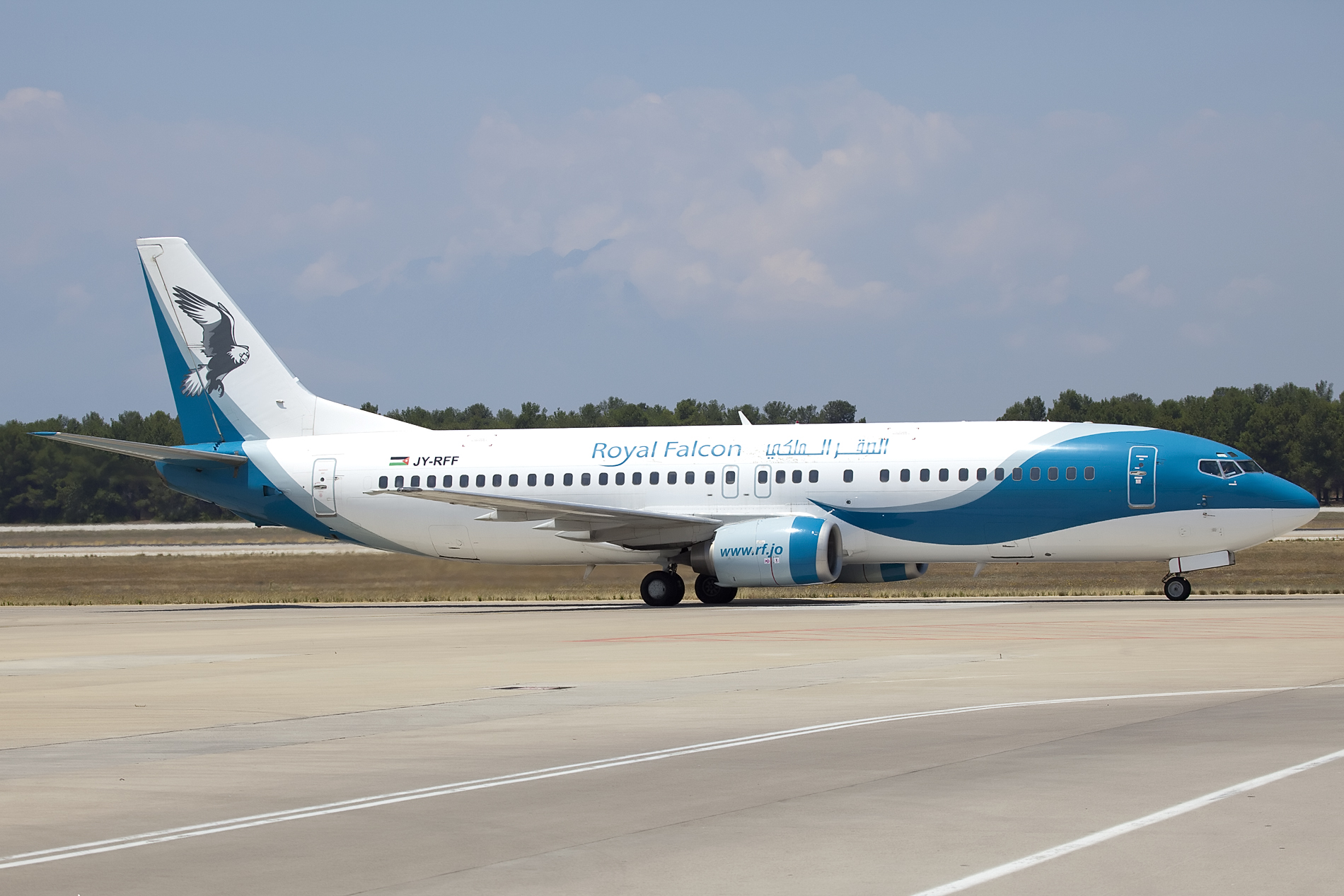 Antalya